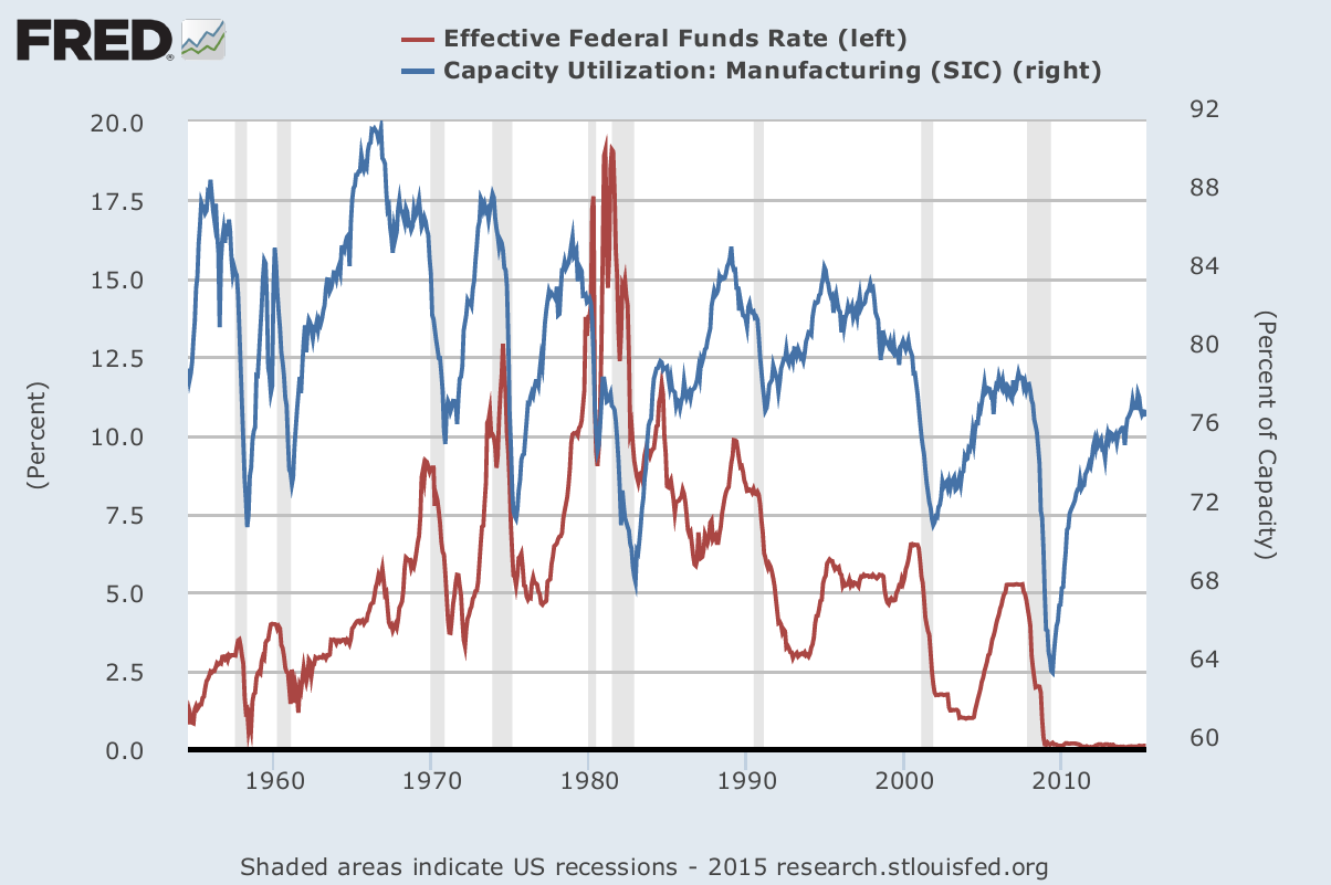 Leitzins der Federal Reserve und Kapazitätsauslastung des Verarbeitenden Gewerbes in den USA Board of Governors of the Federal Reserve System (US), 10-Year Treasury Constant Maturity Rate [DGS10], retrieved from FRED, Federal Reserve Bank of St. Louis July 3, 2015. Board of Governors of the Federal Reserve System (US), Effective Federal Funds Rate [FEDFUNDS], retrieved from FRED, Federal Reserve Bank of St. Louis July 3, 2015.